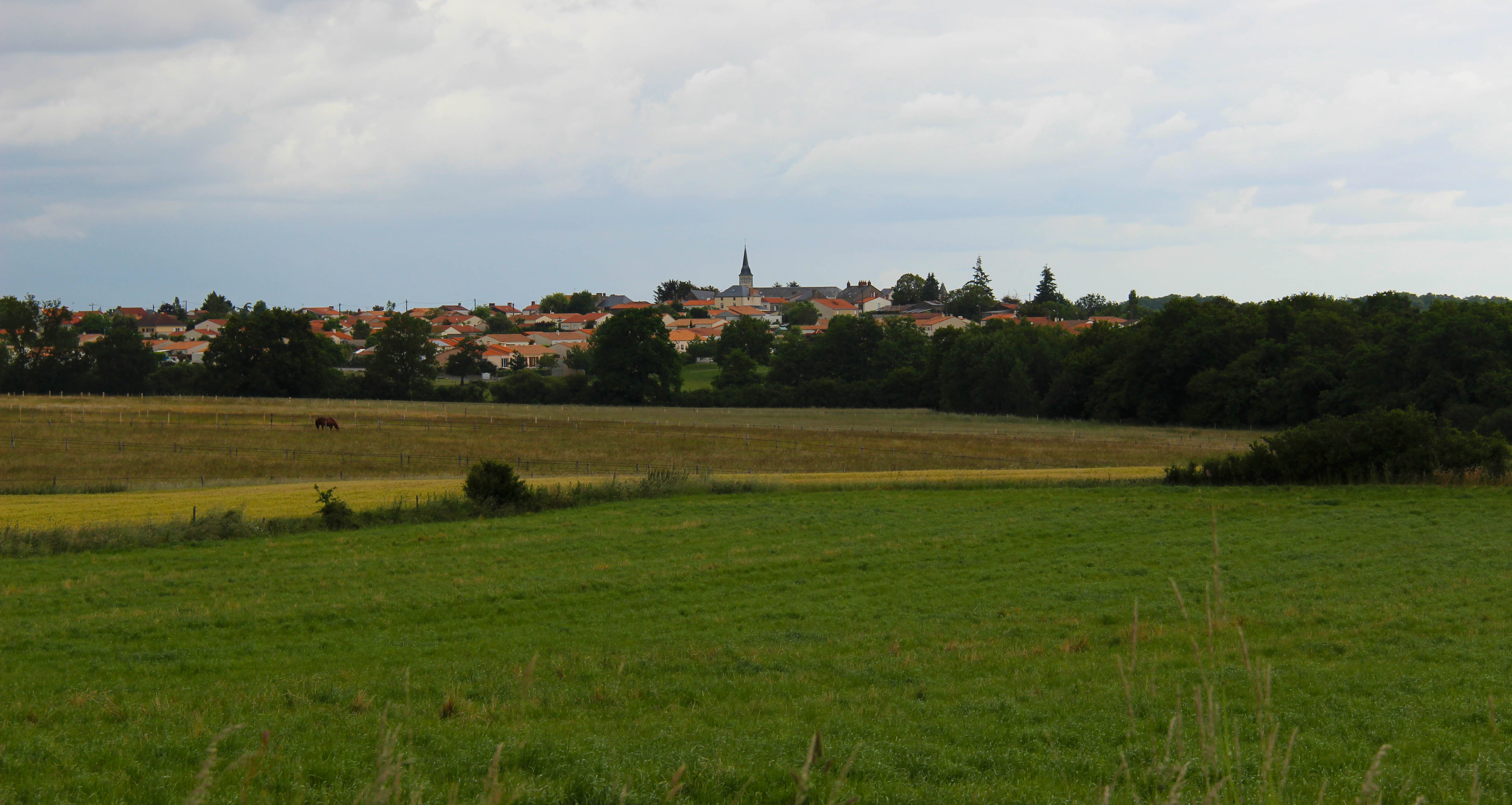 Panorama de la commune de Remouillé, France